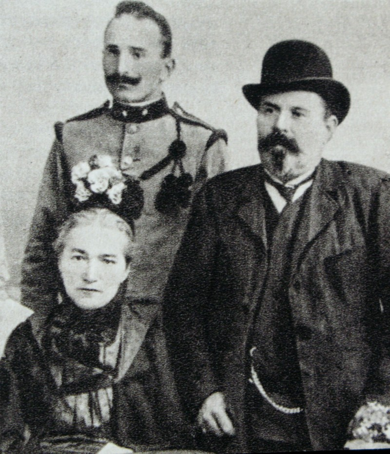 Leon (młodszy) i Michał Ezenkierowie